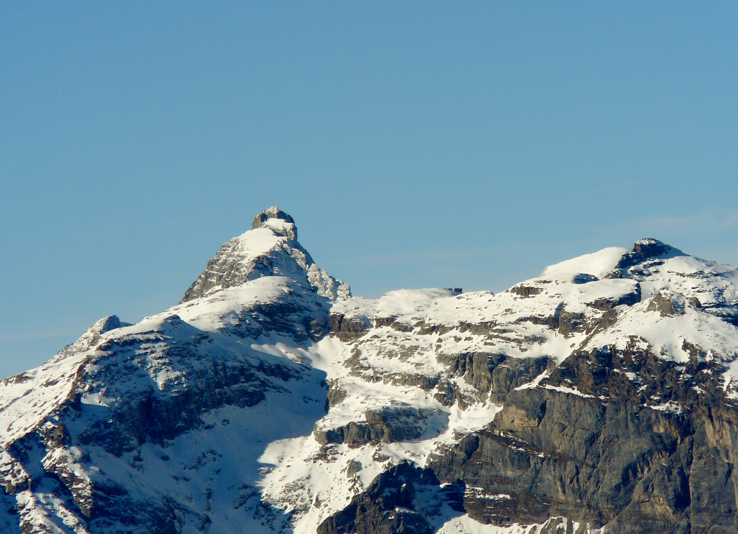 Tribulaun dal dente di Lupo